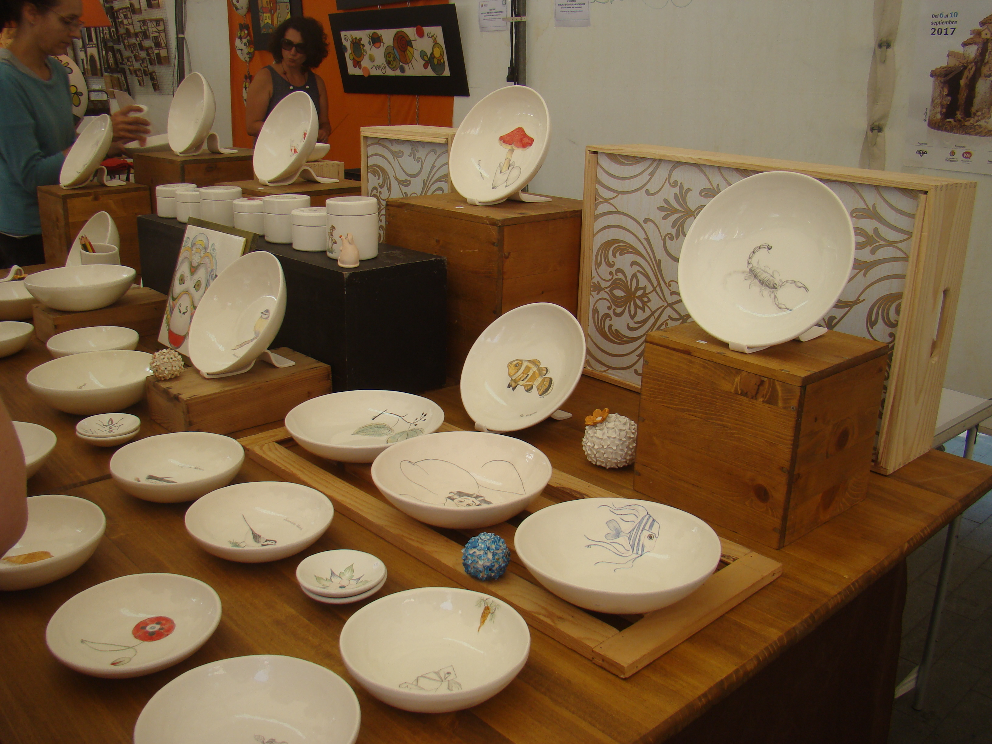 Feria de la Cerámica en el año 2017. Paseo Central del Campo Grande de Valladolid, España. Cerámica de Camponaraya, León.